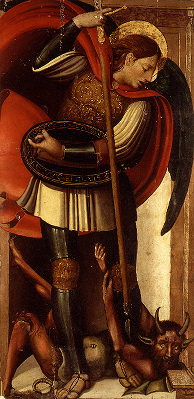 La obra representa a San Miguel Arcángel derrotando a Satanás.